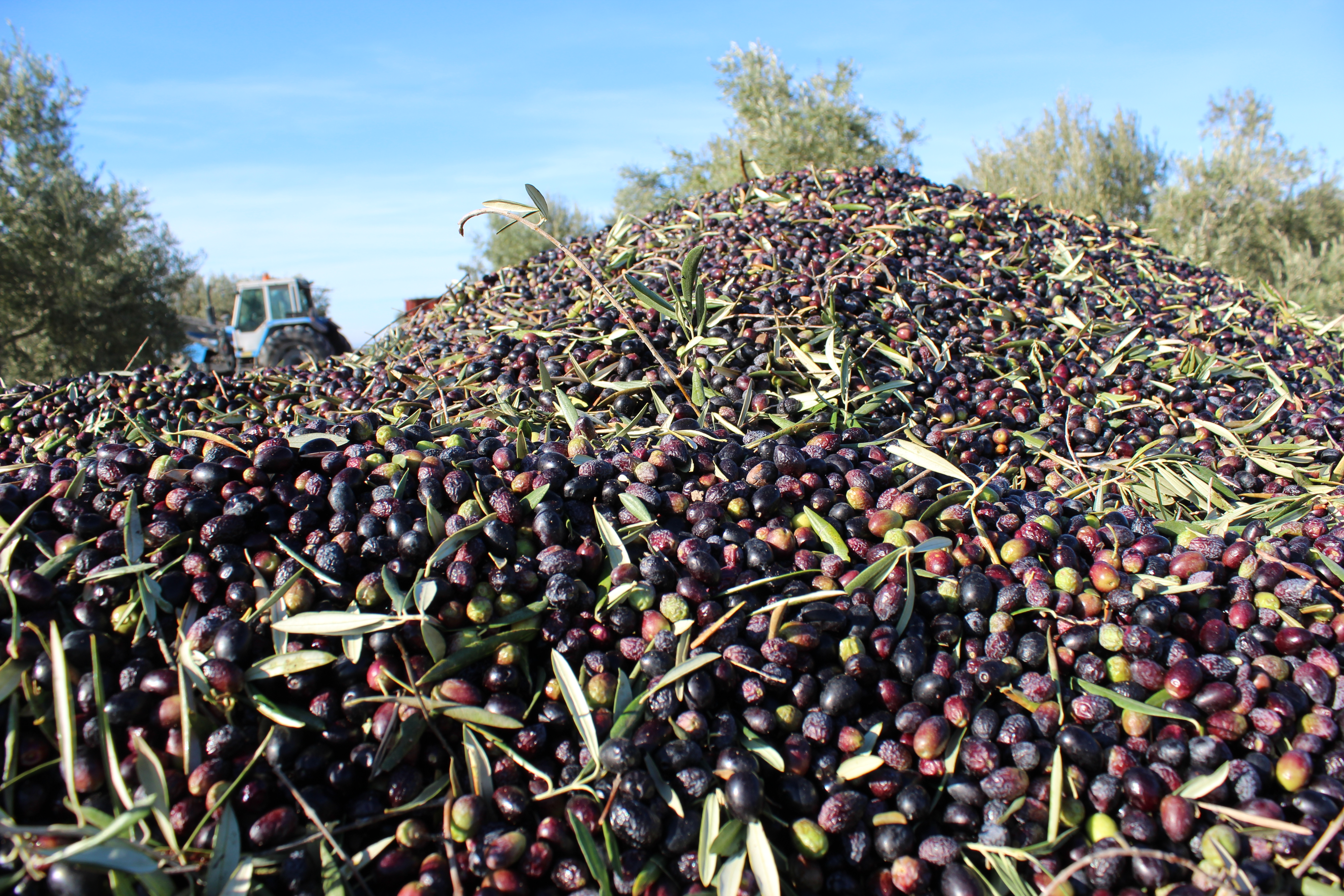 Aceituna destinada a la producción de aceite de oliva, recién recolectada.